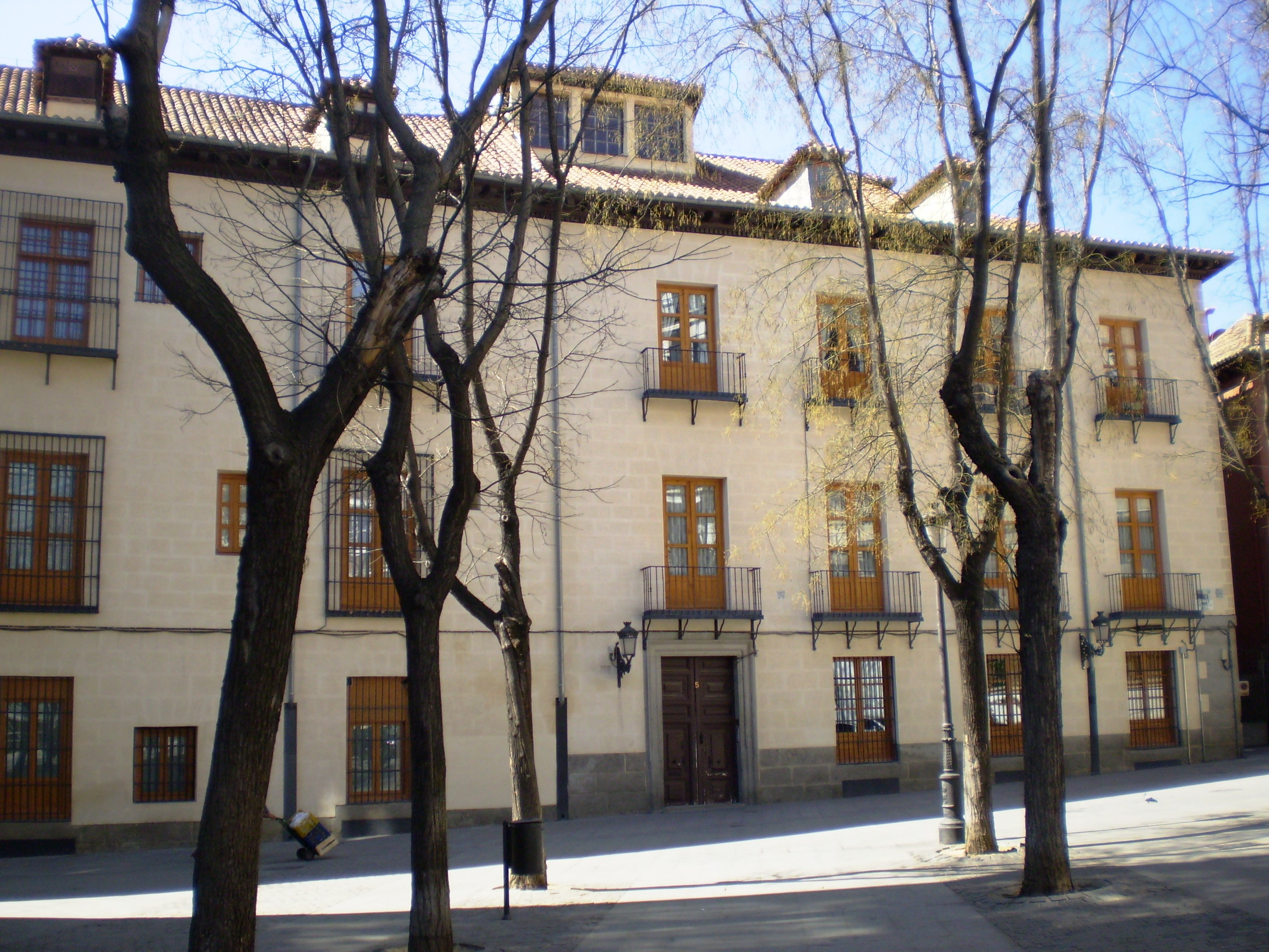 Palacio Arzobispal. Madrid, Spain